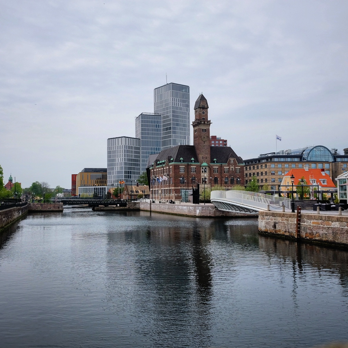 World Maritime University framför Malmö Live, med kanalen i förgrunden.